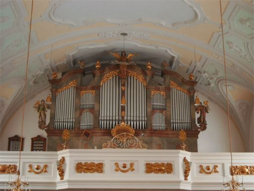 Weigle-Orgel (1909) in St. Michael, Seeshaupt